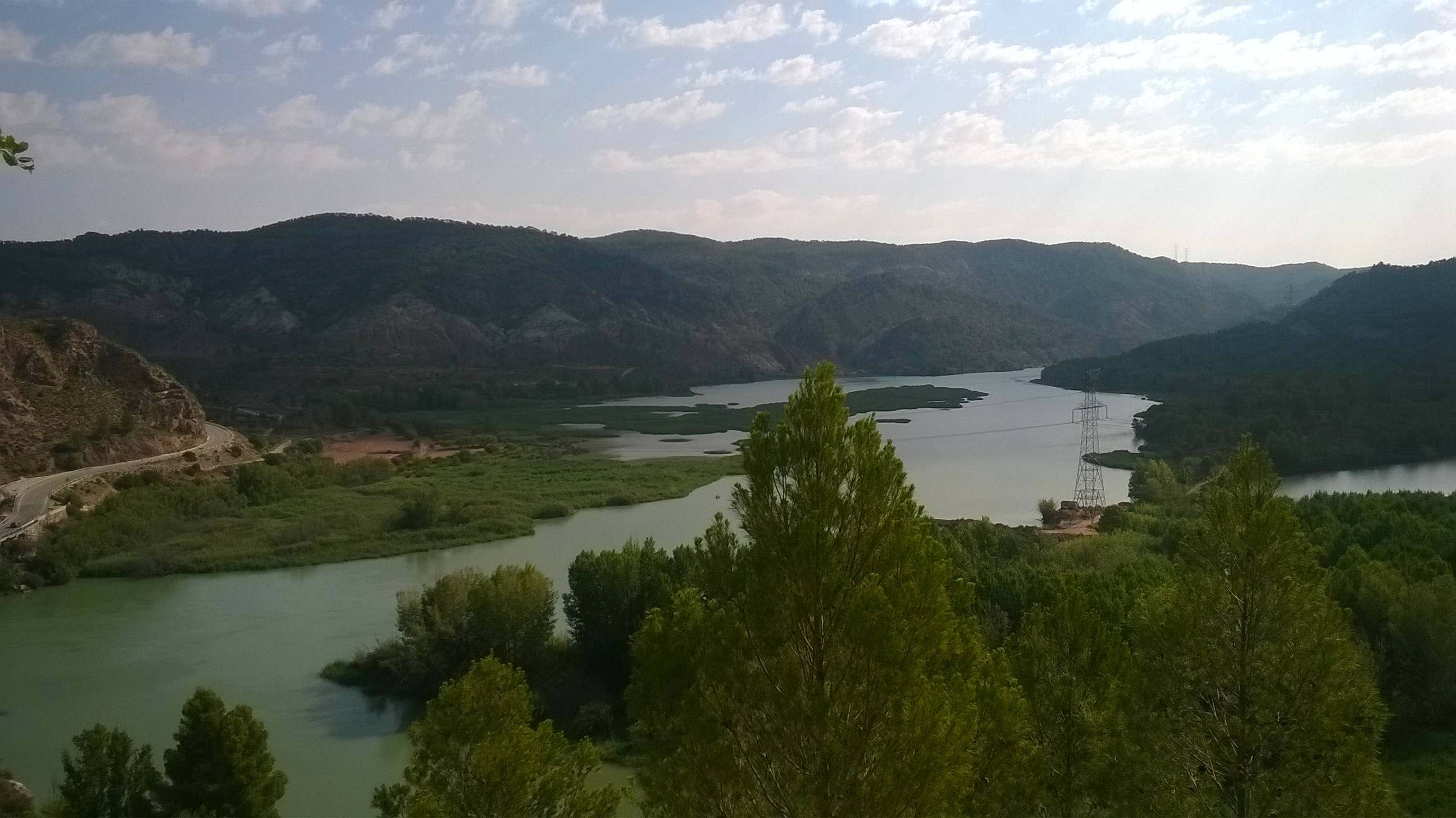 Vistas de Cofrentes tomadas durante el verano de 2014 por Isabel Valiente de la Granja.